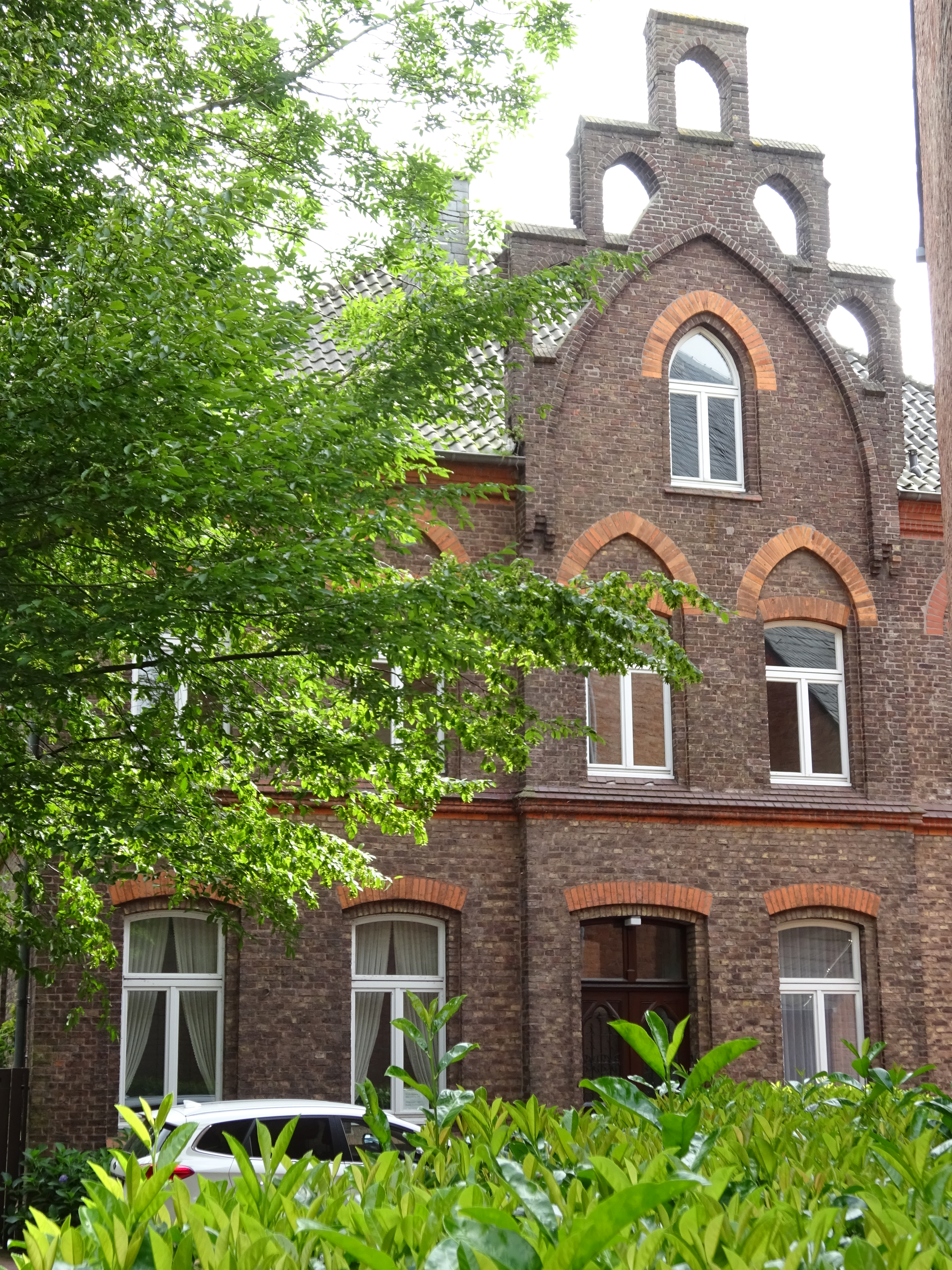 Uedem-Keppeln, Rosenstrasse 6, St. Jodokus Pfarramt